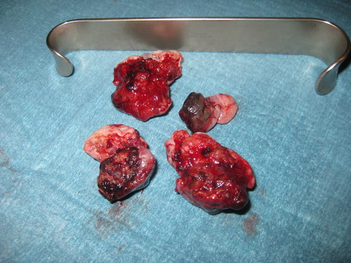 Resezierte Hämorrhoiden-Polster nach einer Hämorrhoidenoperation nach Milligan Morgan.